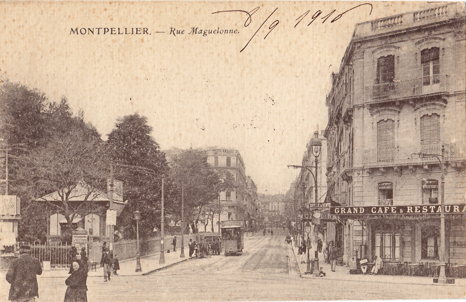 Carte postale ancienne éditée par Jeanguette :MONTPELLIER - Rue Maguelonne